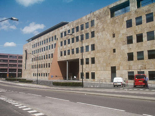 Amsterdam Zuidoost, ING-Bank